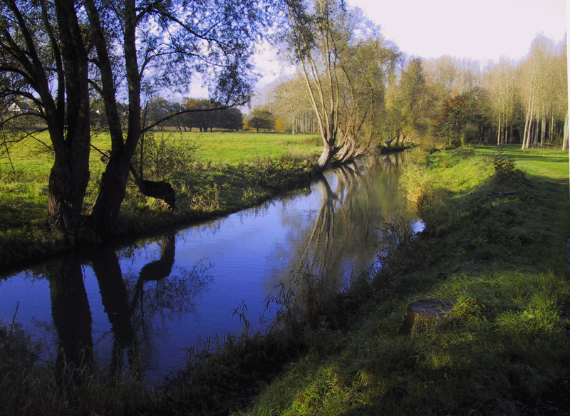 photo personnelle domaine public